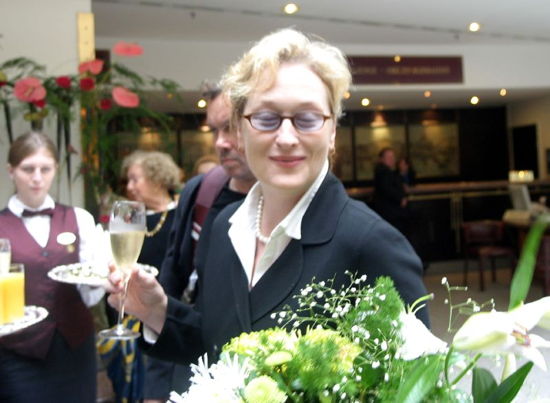 Meryl Streep in St-Petersburg, Russia